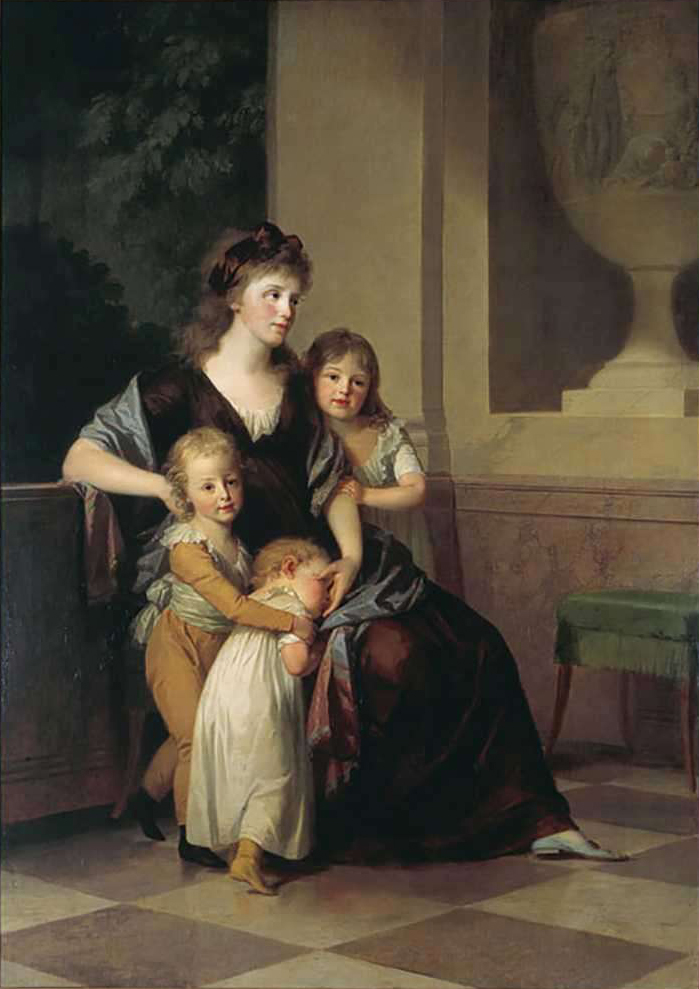 Christiane Amalie Erbprinzessin von Anhalt-Dessau (1774-1846) mit drei Kindern